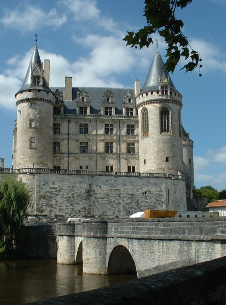 Château de La Rochefoucauld en Charente (France)